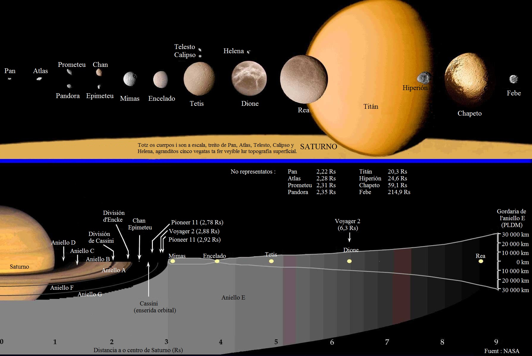 Aragonés: Os aniellos de Saturno en o tocant a las orbitas de beluns d'os suyos satelites.